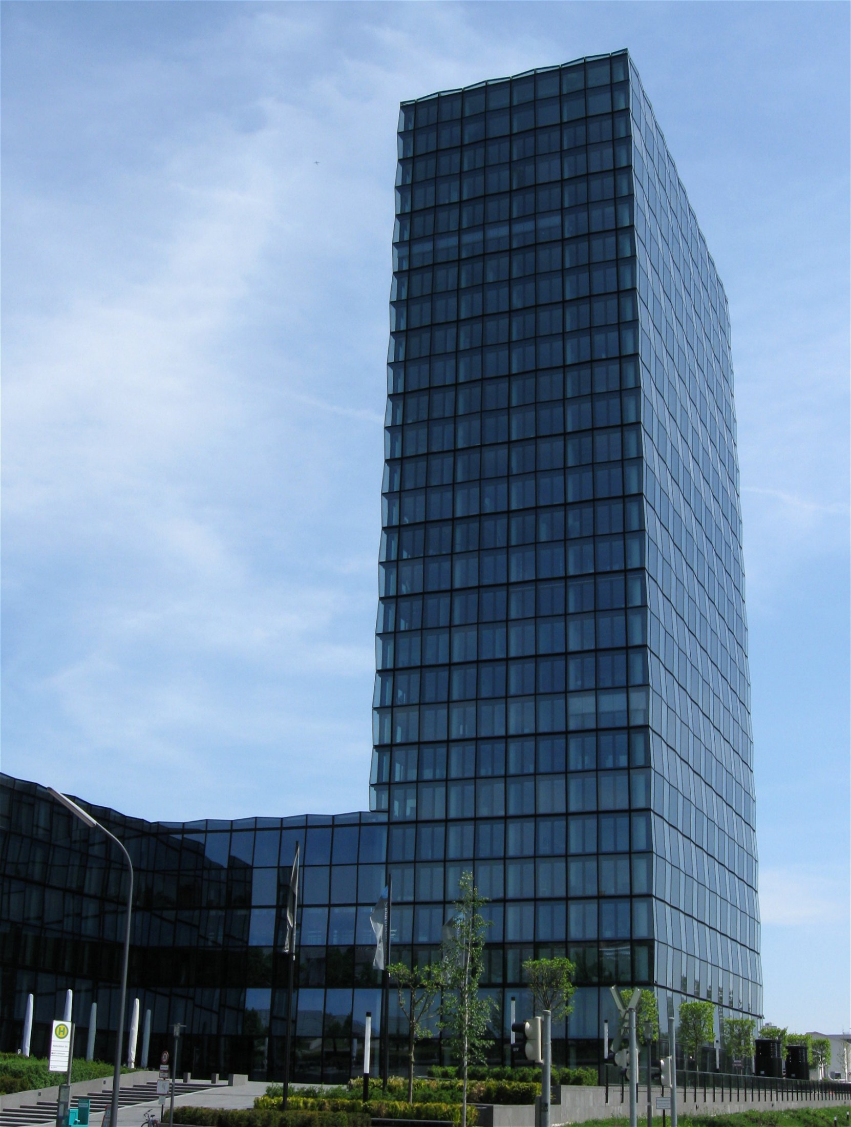 SV-Hochhaus in München